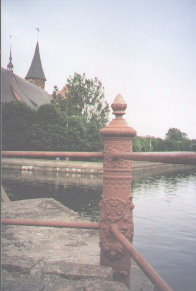 Старинный столбик из ограждения Деревянного моста. На столбике виден герб Кнайпхофа - поднятая из воды рука, держащяя корону